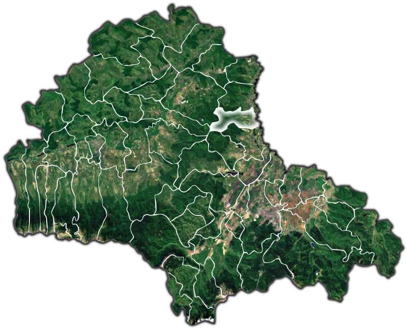 Maierus jud Brasov